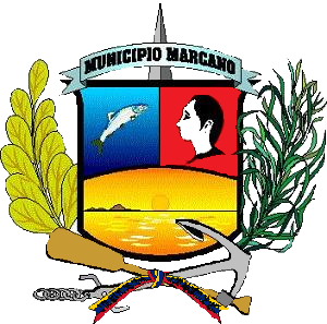 Escudo del municipio Marcano. Isla de Margarita. Estado Nueva Esparta. Venezuela